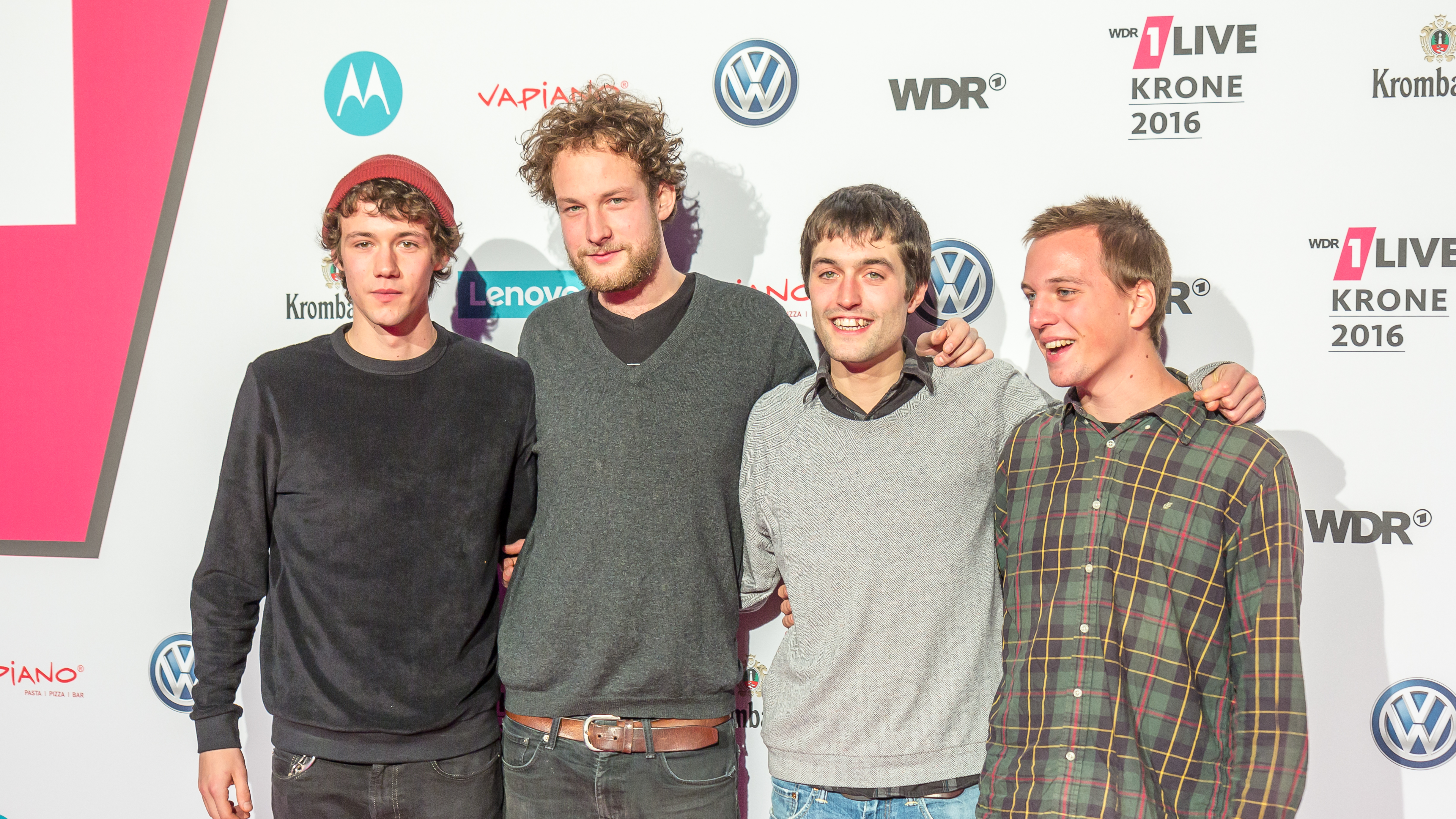 1LIVE Krone 2016 - 1700 - Roter Teppich - AnnenMayKantereit